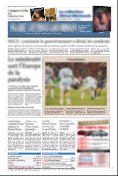 La une d'un grand quotidien français